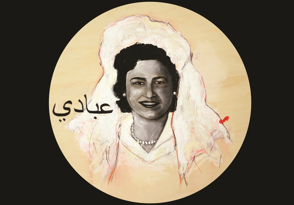 הכלה הסורית בתוך הערך שי עבאדי